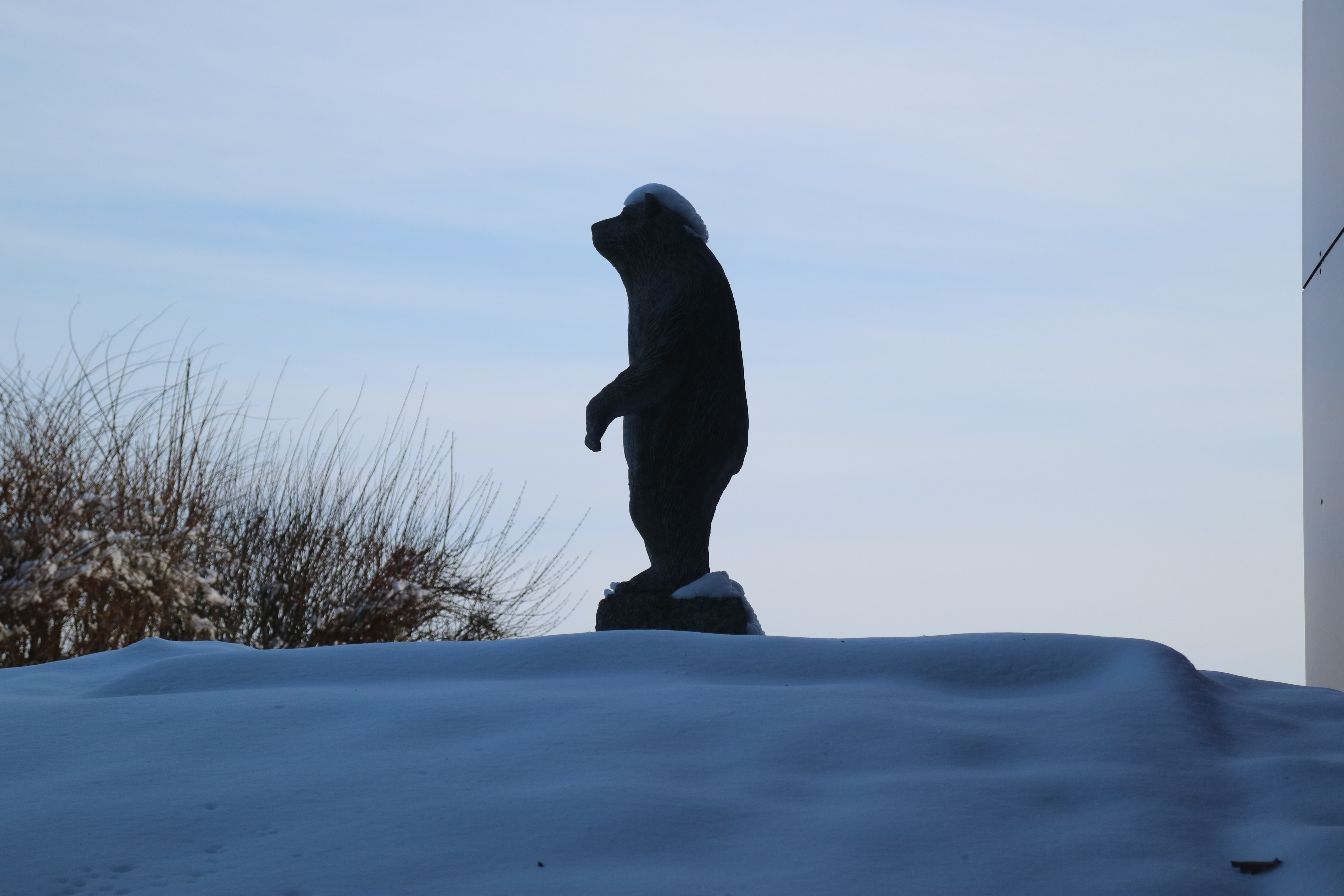 Statue zum Windorfer Bärenfang in Pirka (Steiermark), errichtet 2010 anlässlich der 25-jährigen Partnerschaft der Gemeinden Windorf (Bayern) und Pirka/Windorf